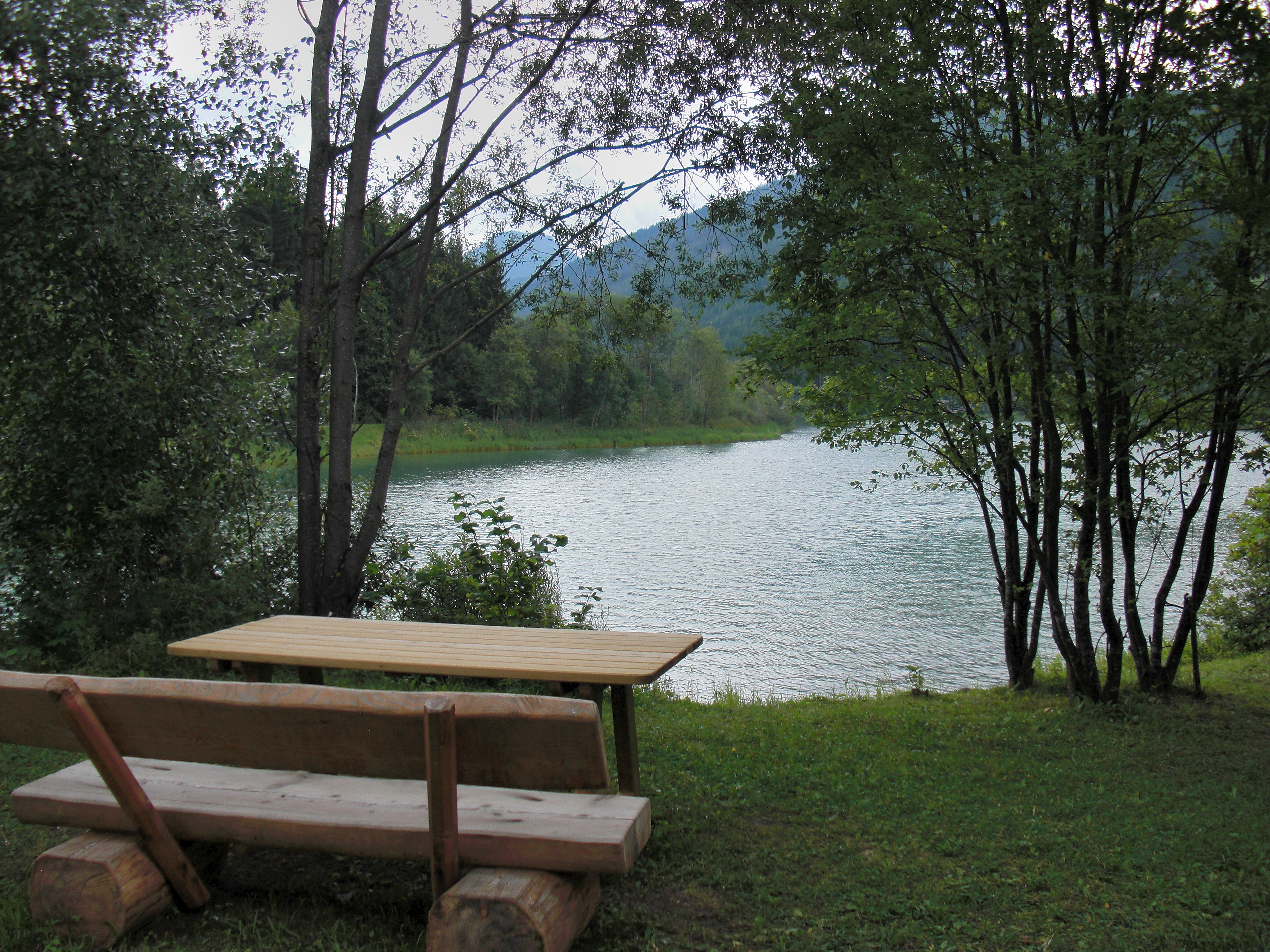 Blick auf den Speicher Tassenbach in Strassen, Osttriol (Österreich).